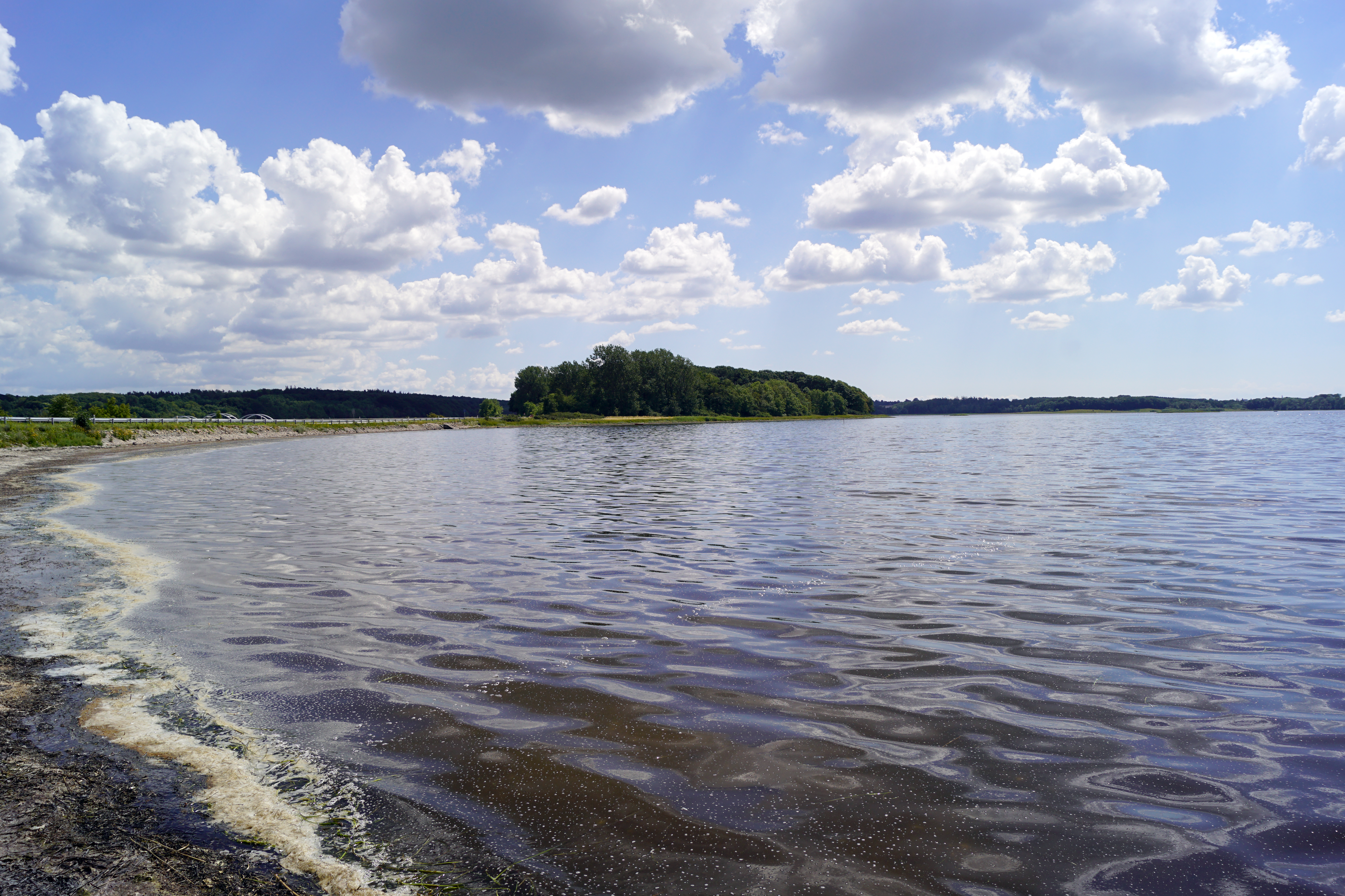 Munkholm i Isefjorden set mod syd, med dæmningen, og Munkholmbroen i baggrunden